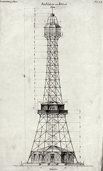 Projekt rozhledny na Petříně.